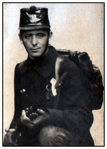 Alfred Ross, 12eme de Ligne, mort à Rabosée le 6 août 1914